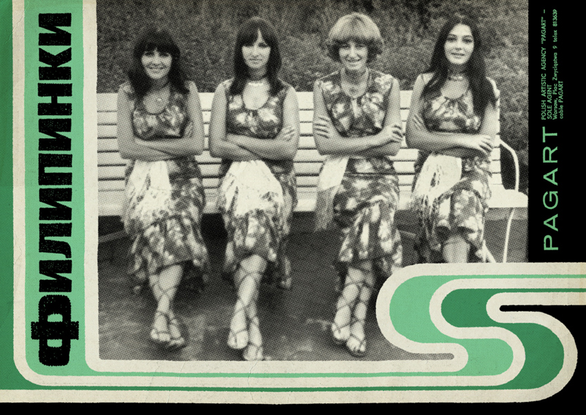 Ulotka reklamująca Filipinki podczas trasy po Związku Radzieckim w 1970 r.